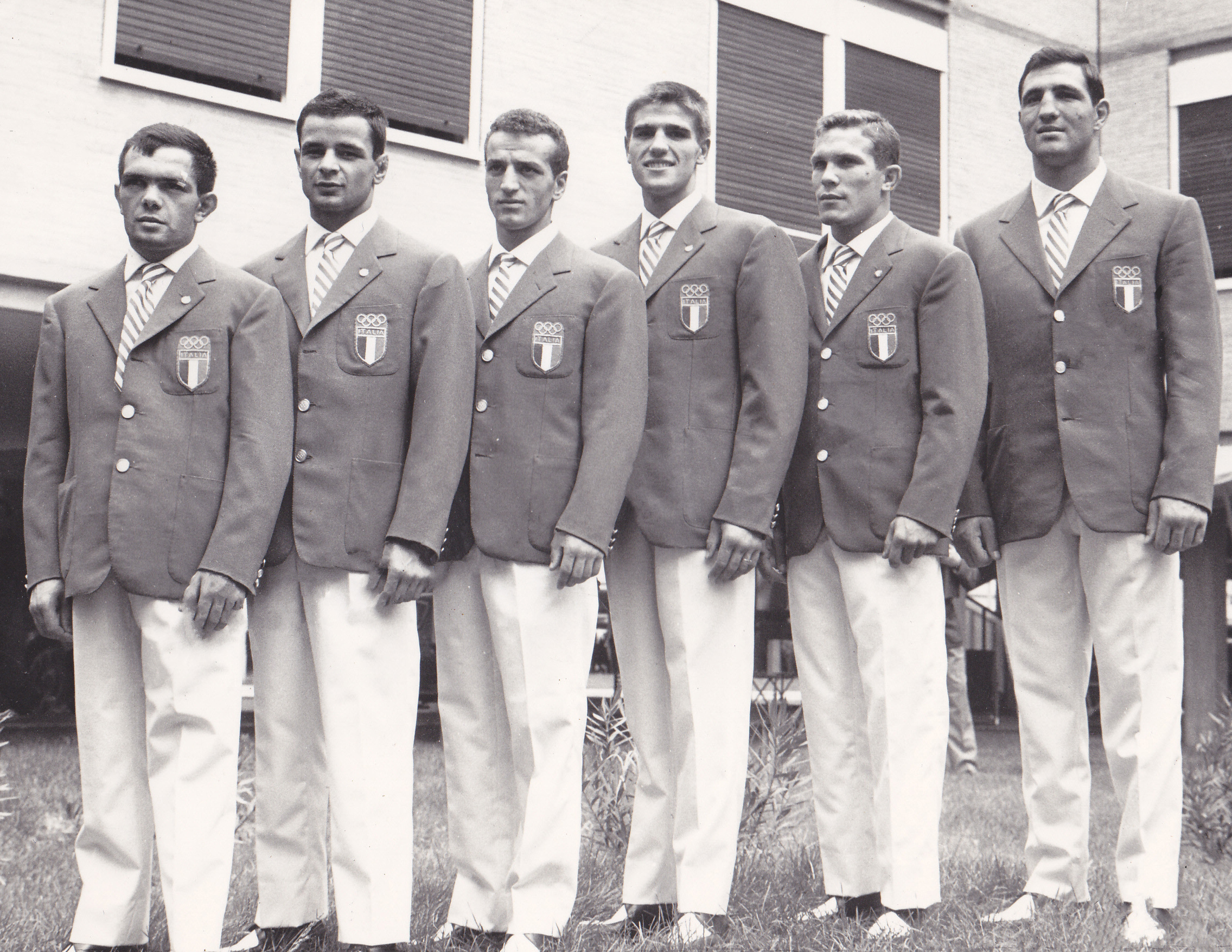 Primo Zamparini, Francesco Musso, Sandro Lopopolo, Nino Benvenuti, Carmelo Bossi, Francesco de Piccoli, 1960 Olympics